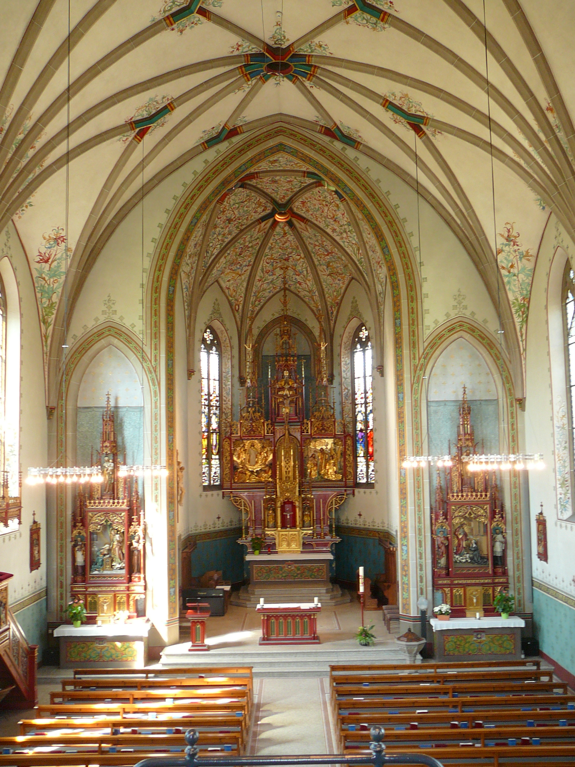 Dreifaltigkeitskirche Bülach Blick, zum Hochaltar